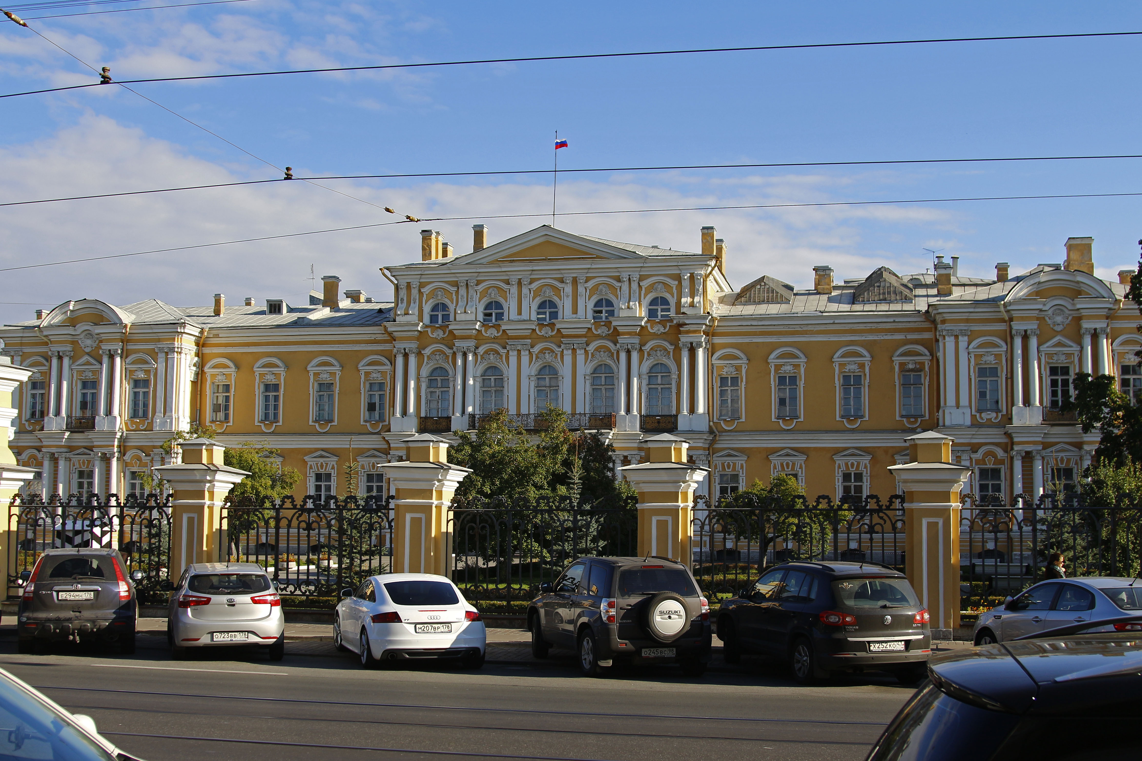 Дворец Воронцова М. И. (Пажеский корпус) (Санкт-Петербург и Лен.область, Санкт-Петербург, Садовая улица, 26, Ломоносова улица, 6, 8, 10)